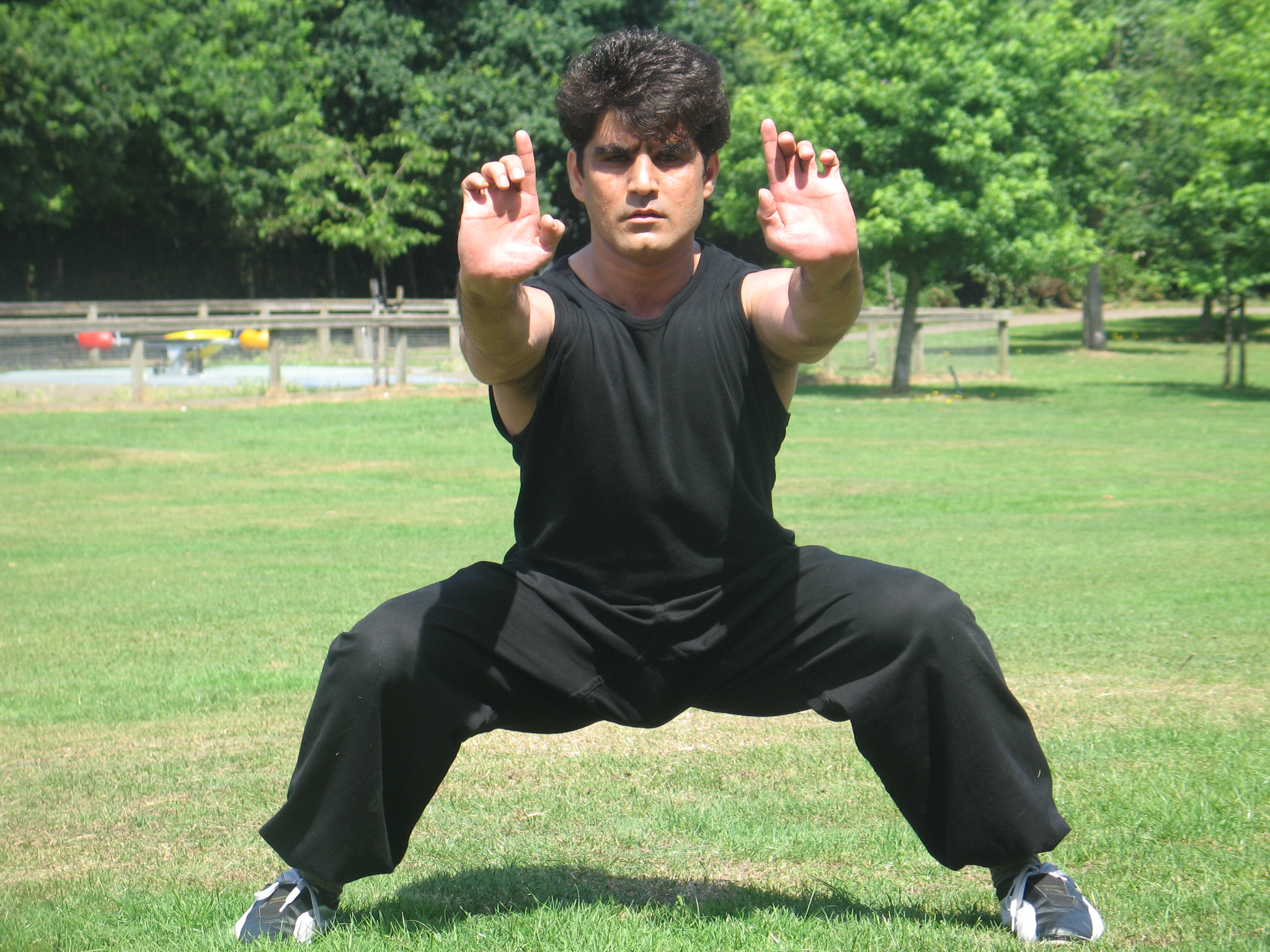 پښتو: احسان شفيق د کانګفو يو اتل